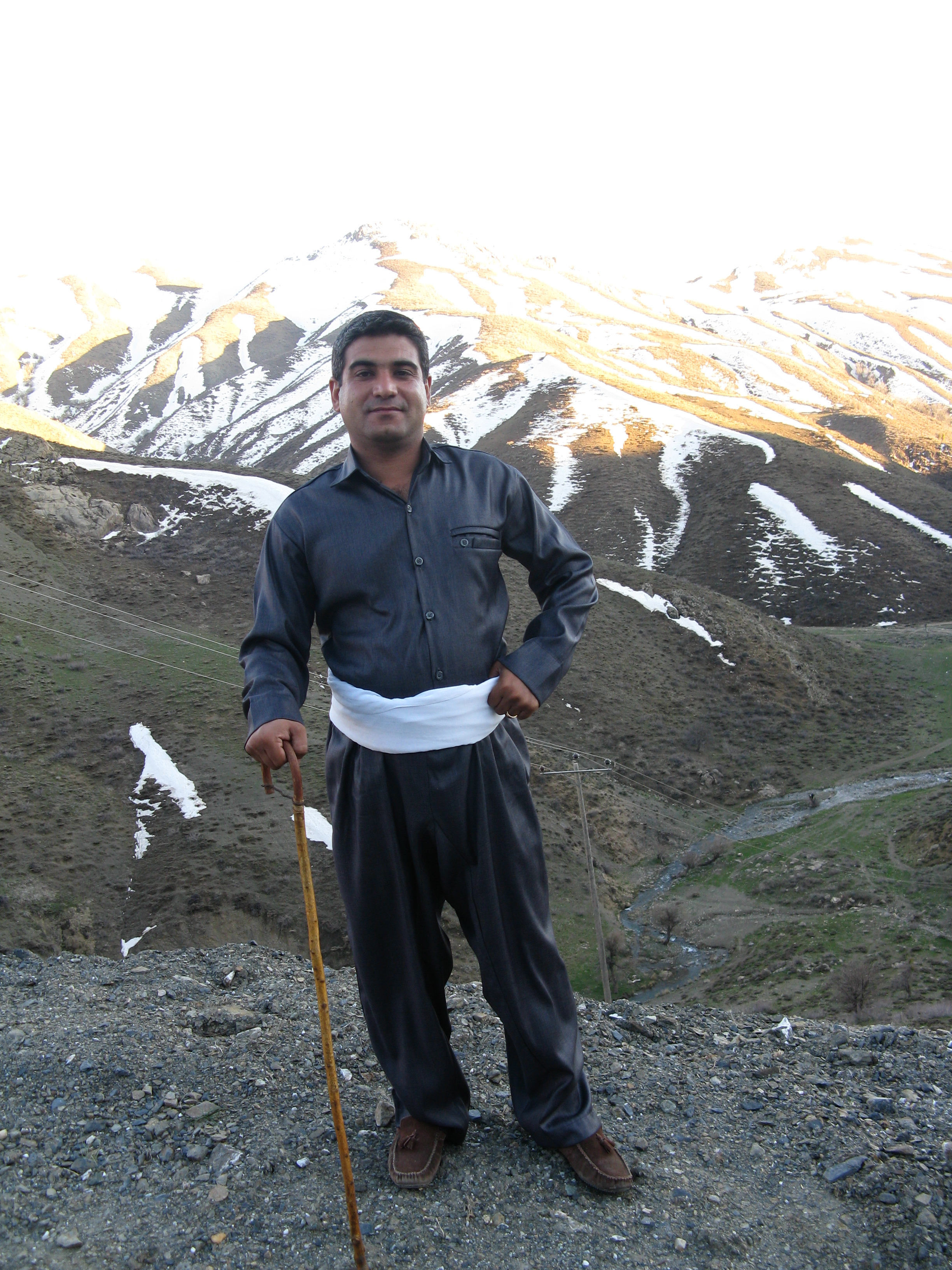 لباس کردی..چوخا و رانک..گورچنگ یا چوب دستی